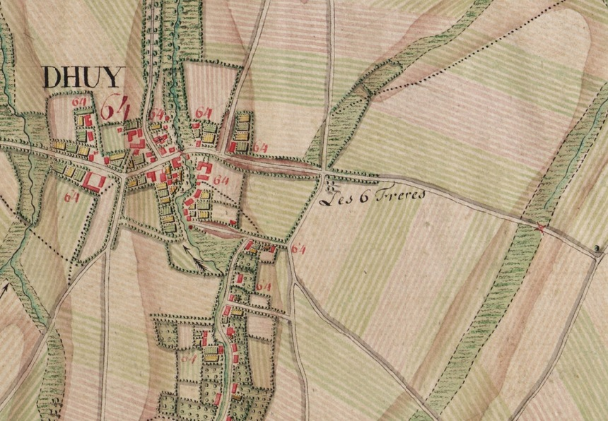 Extrait de la carte de Ferraris n° 115B